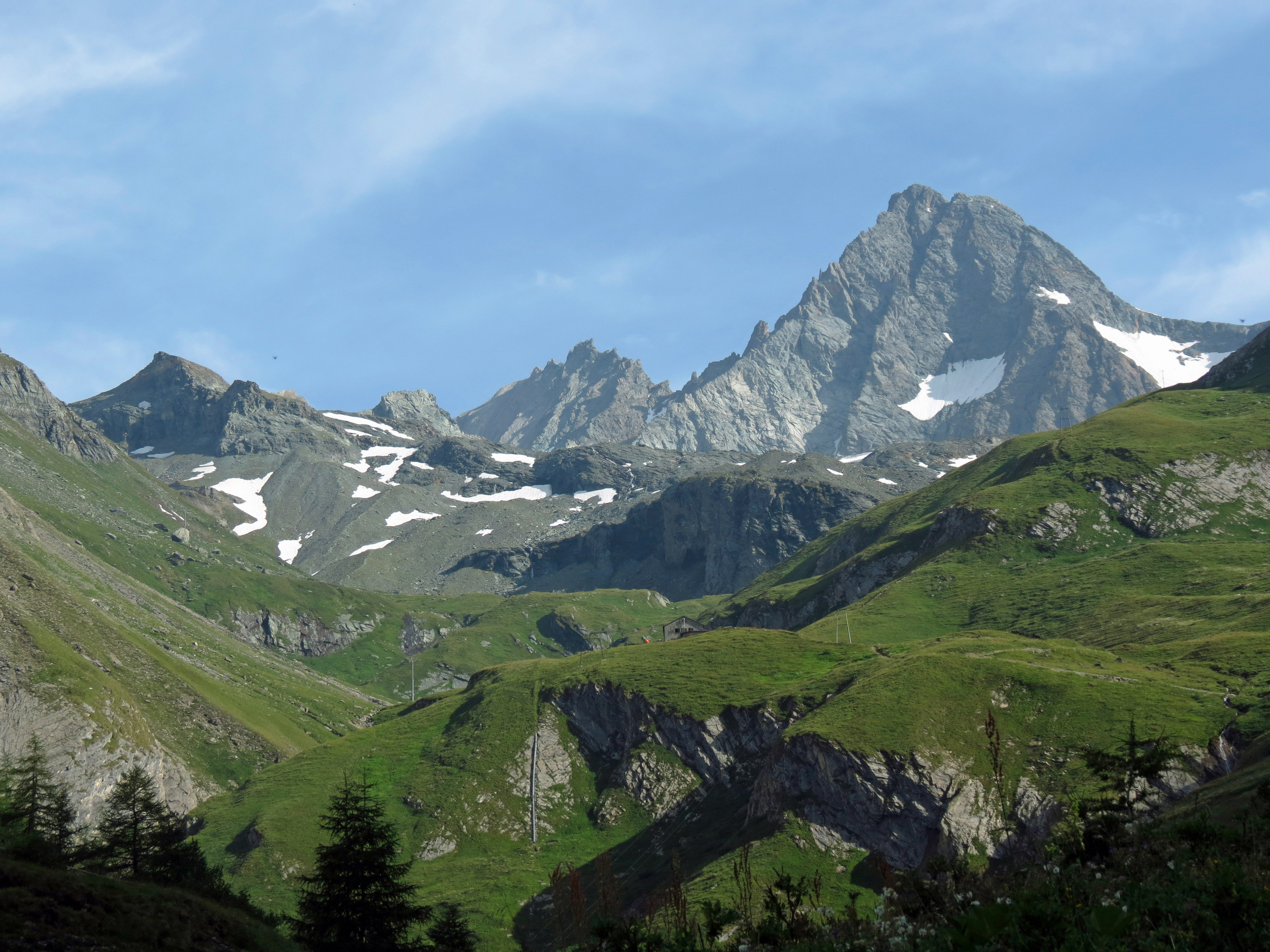 Grossglockner